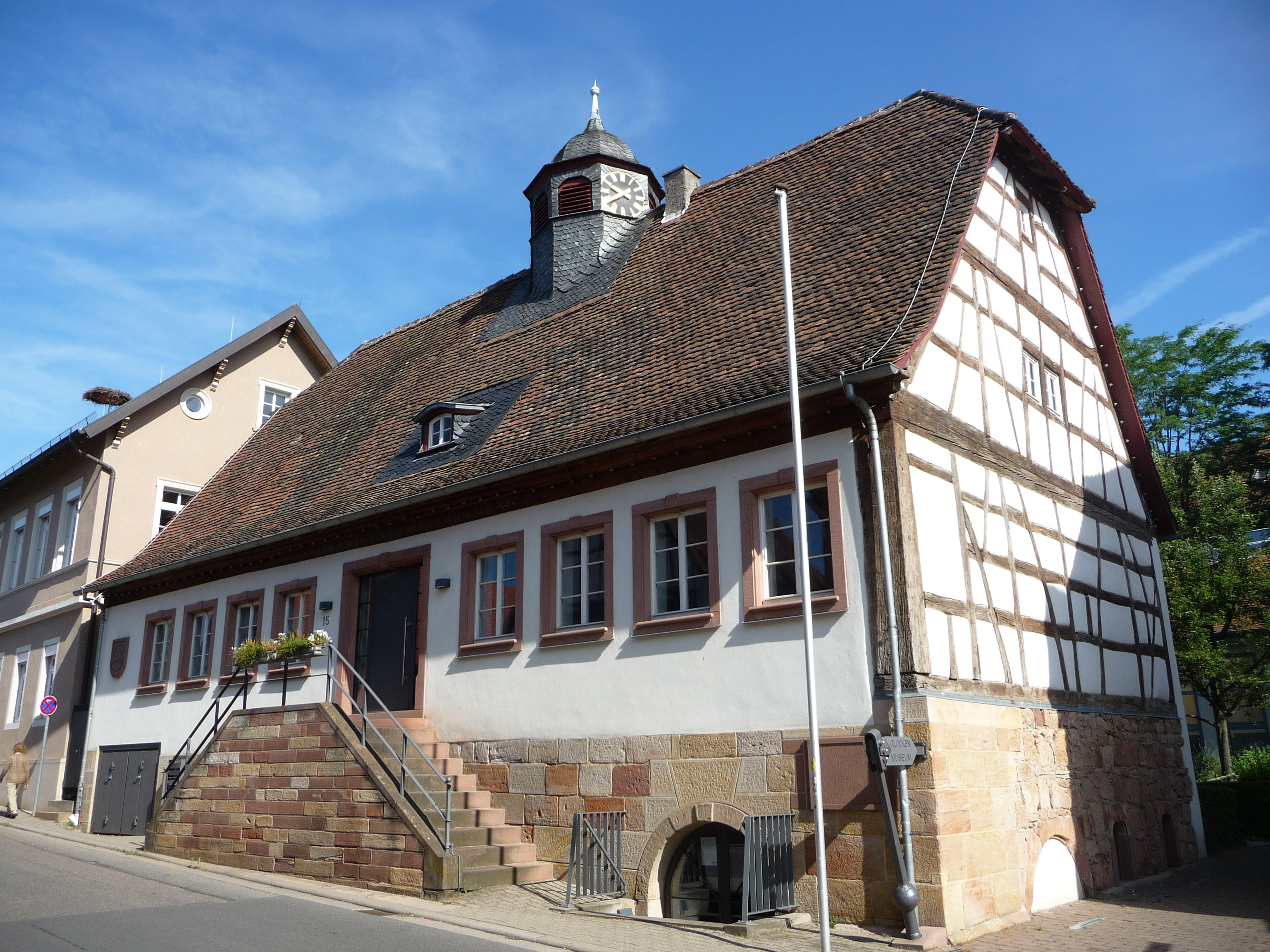 Insheim, Rheinland-Pfalz